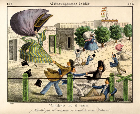 Los Peinetones en la serie de Extravagancias de 1834.